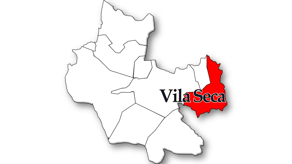 População